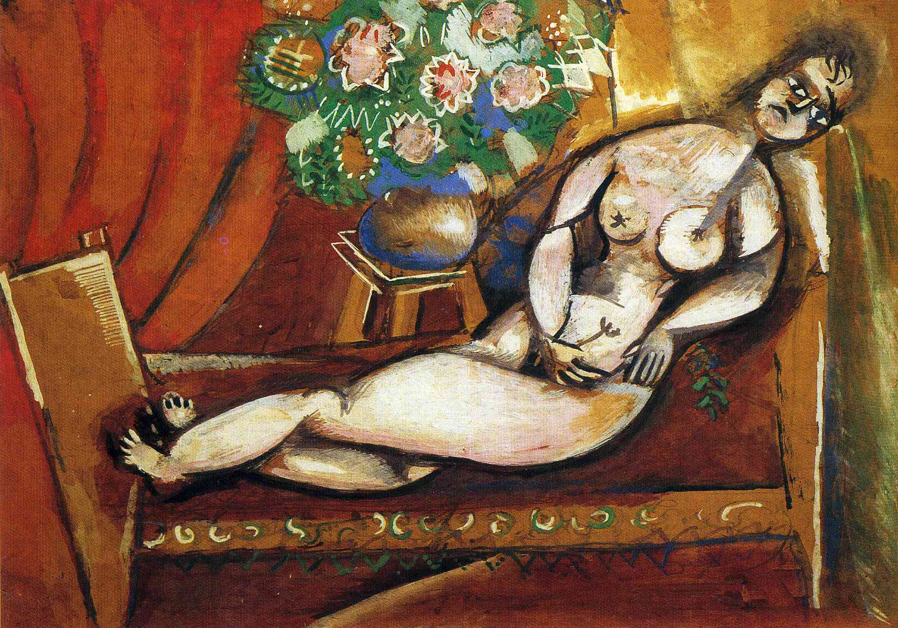 Полулежащая обнаженная Марк Шагал гуашь, картон Размеры: 24 x 34 см частное собрание